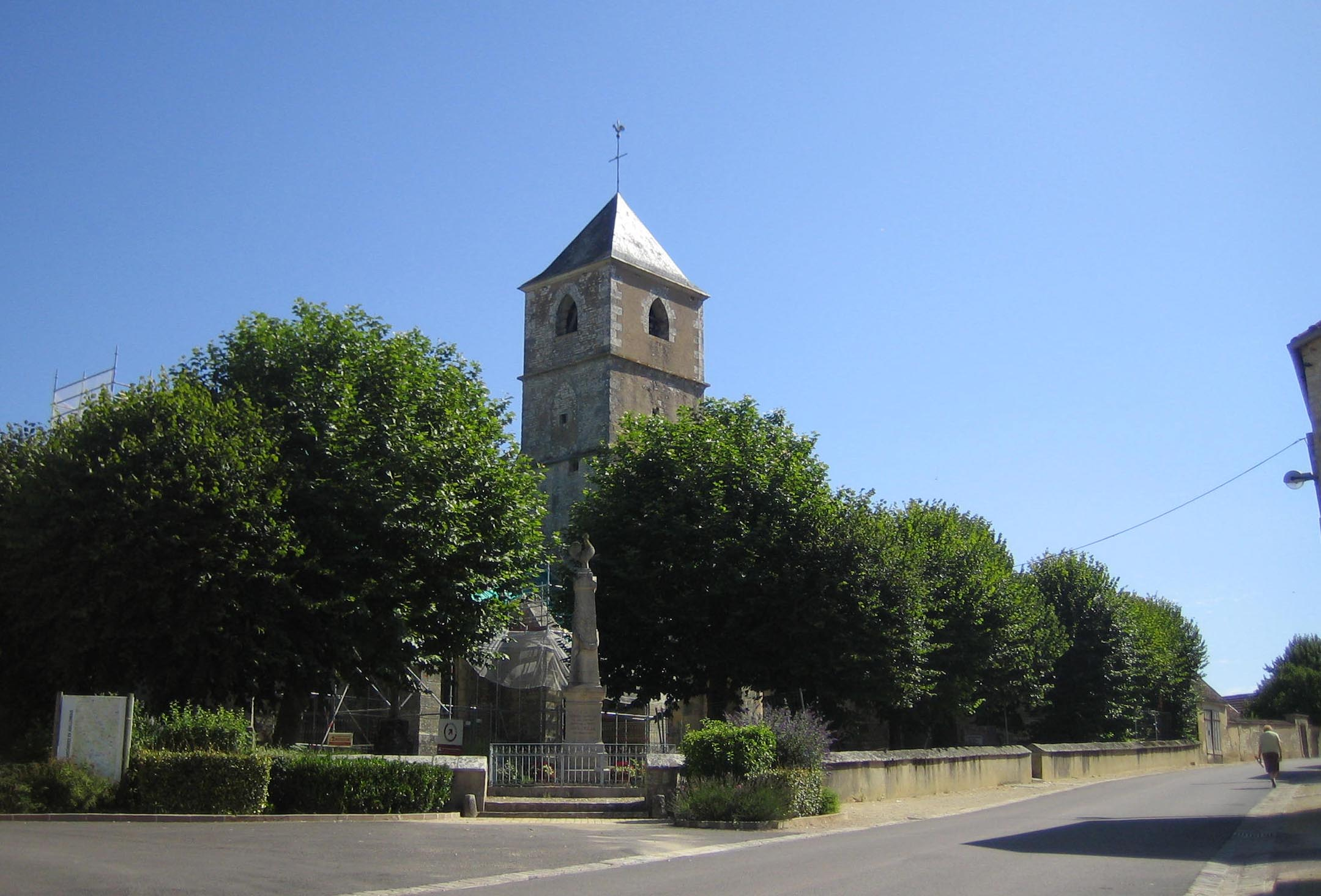 Joux-la-Ville (Yonne, Bourgogne, France). L'église.